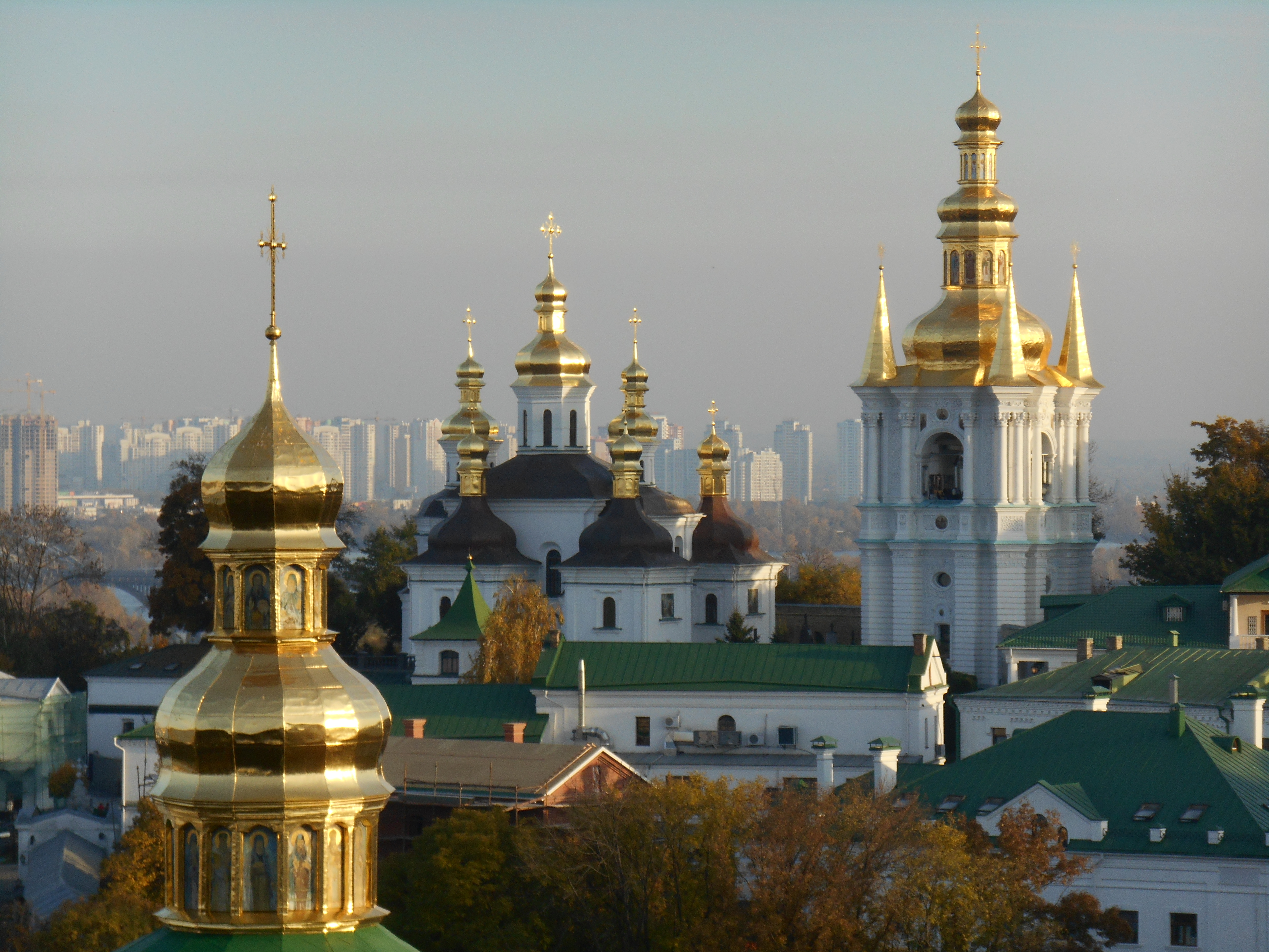 Дзвіниця на Дальніх печерах, Київ, Лаврська вул., 9